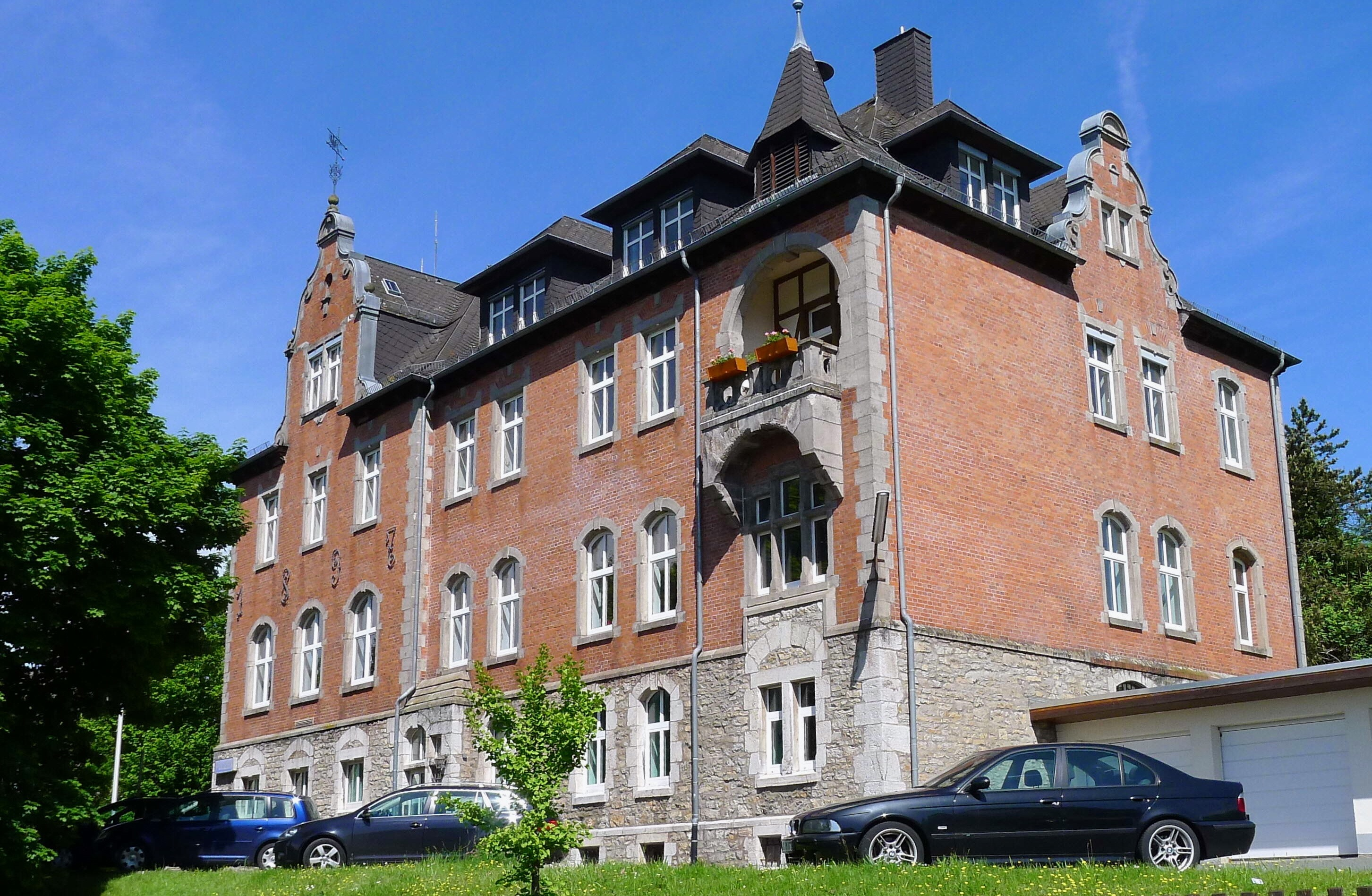 Das ehemalige Amtsgericht Ehringshausen (Lahn-Dill-Kreis)